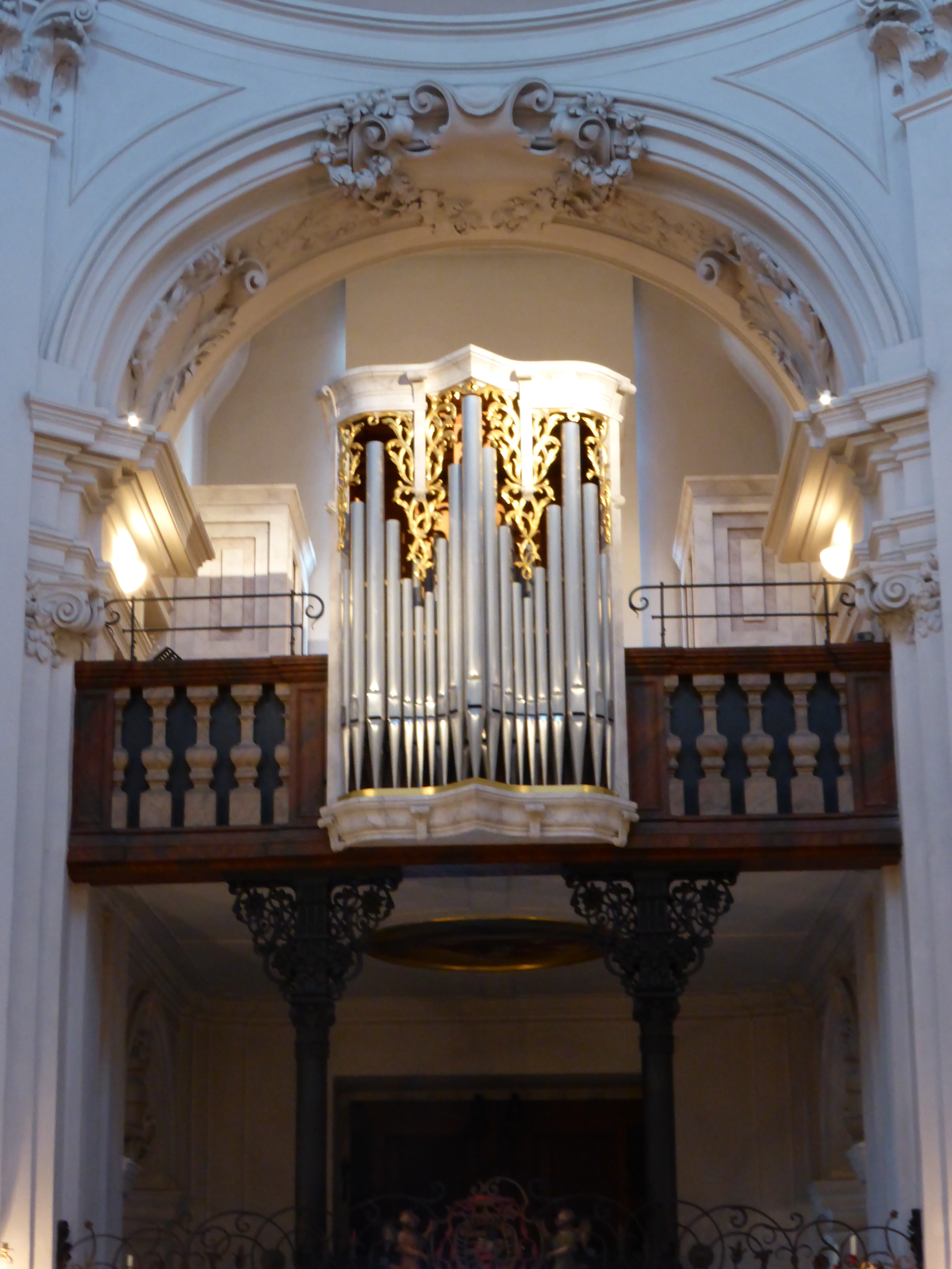 Orgel der Dreifaltkigkeitskirche (Priesterseminar) in Salzburg aus dem Jahre 1997